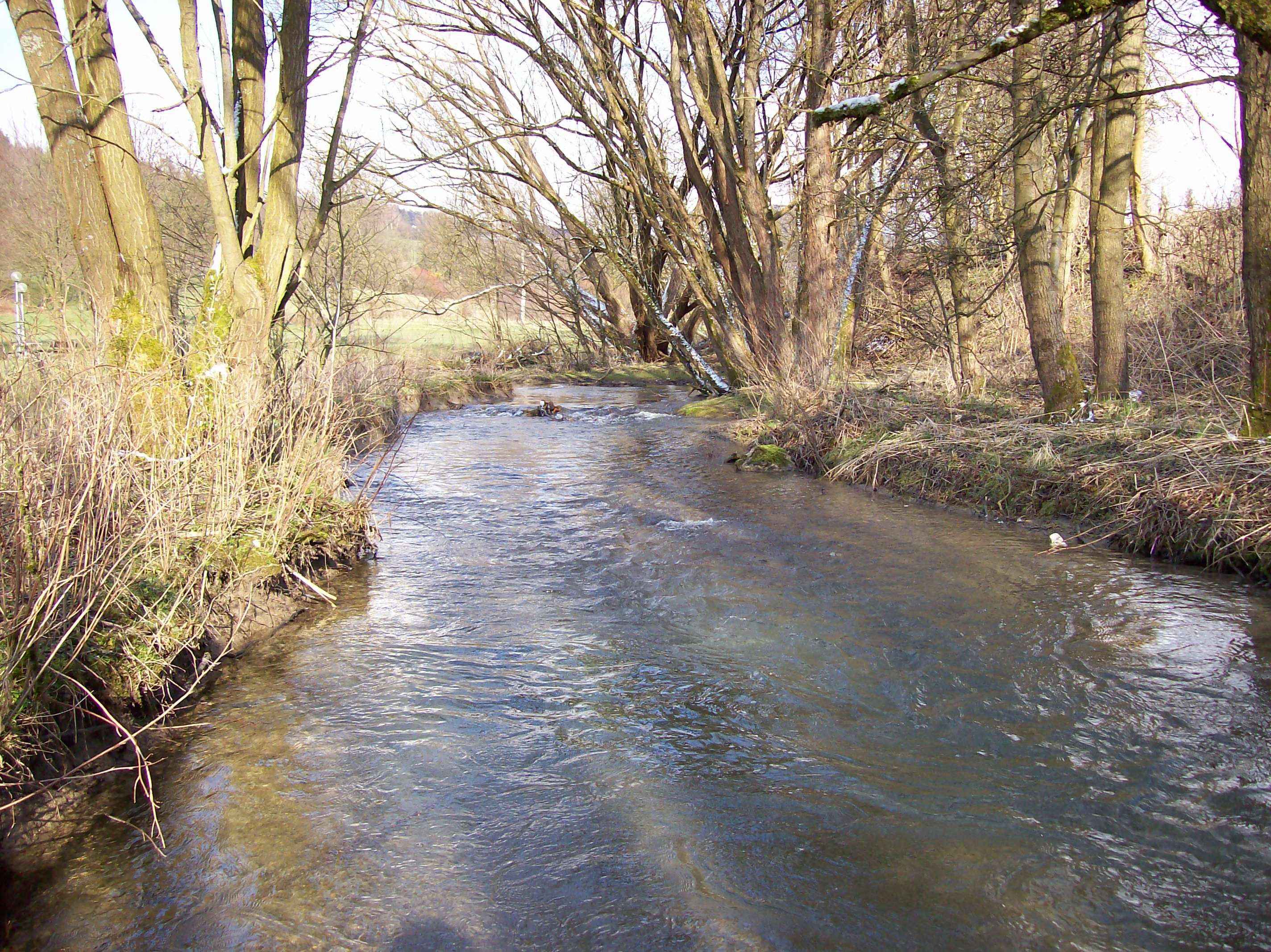 Grafschaft, Nebenfluss der Lenne in Schmallenberg (North Rhine-Westphalia, Germany)